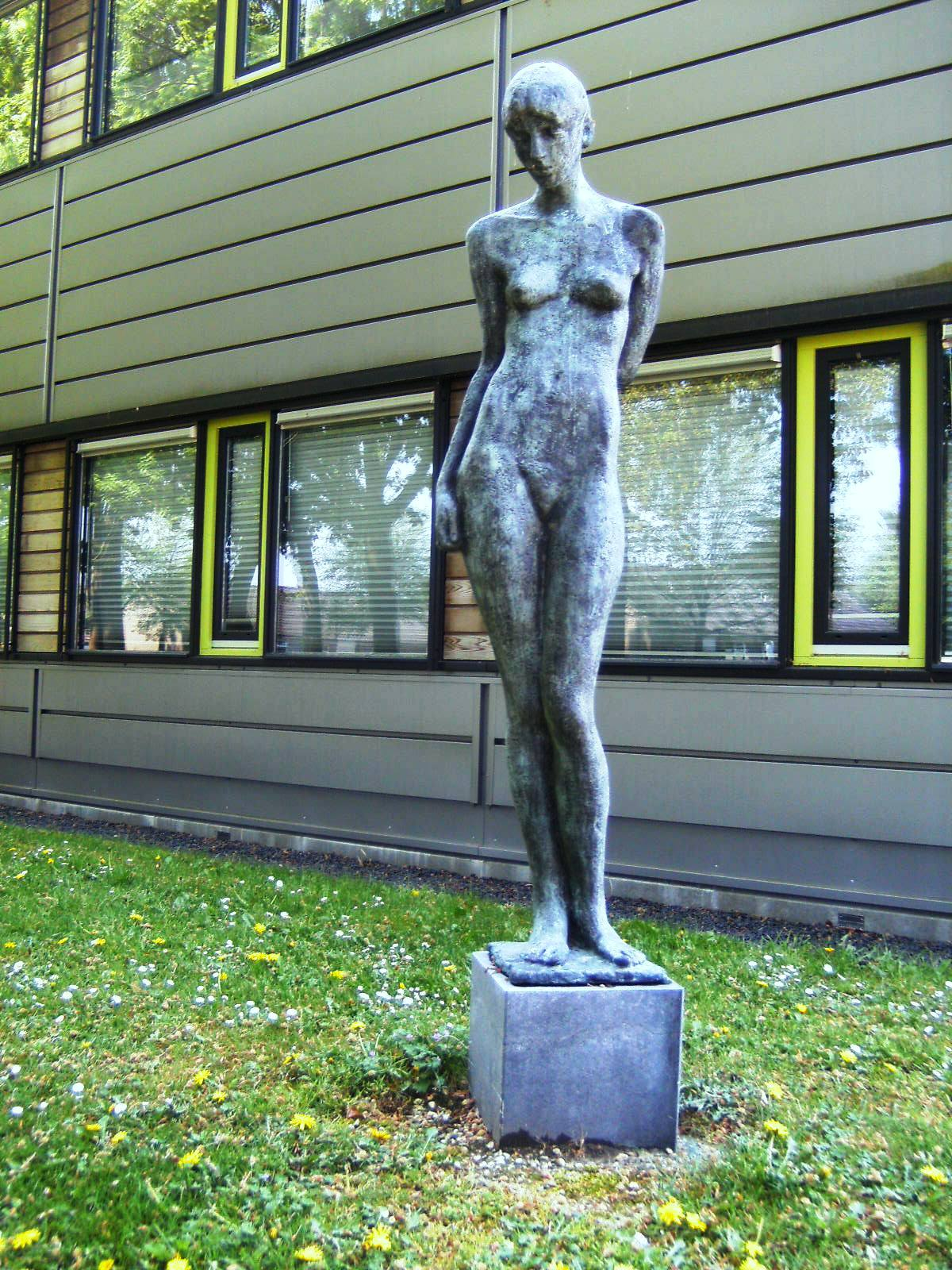 Claartje. Naakt van Paul de Swaaf (1934) uit 1985 bij Gezondheidscentrum Den Papendiek te Groenlo